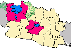 Les conurbations du Jabodetabek et du Grand Bandung